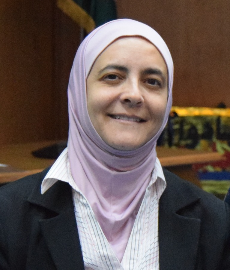 Rəna Dəcani